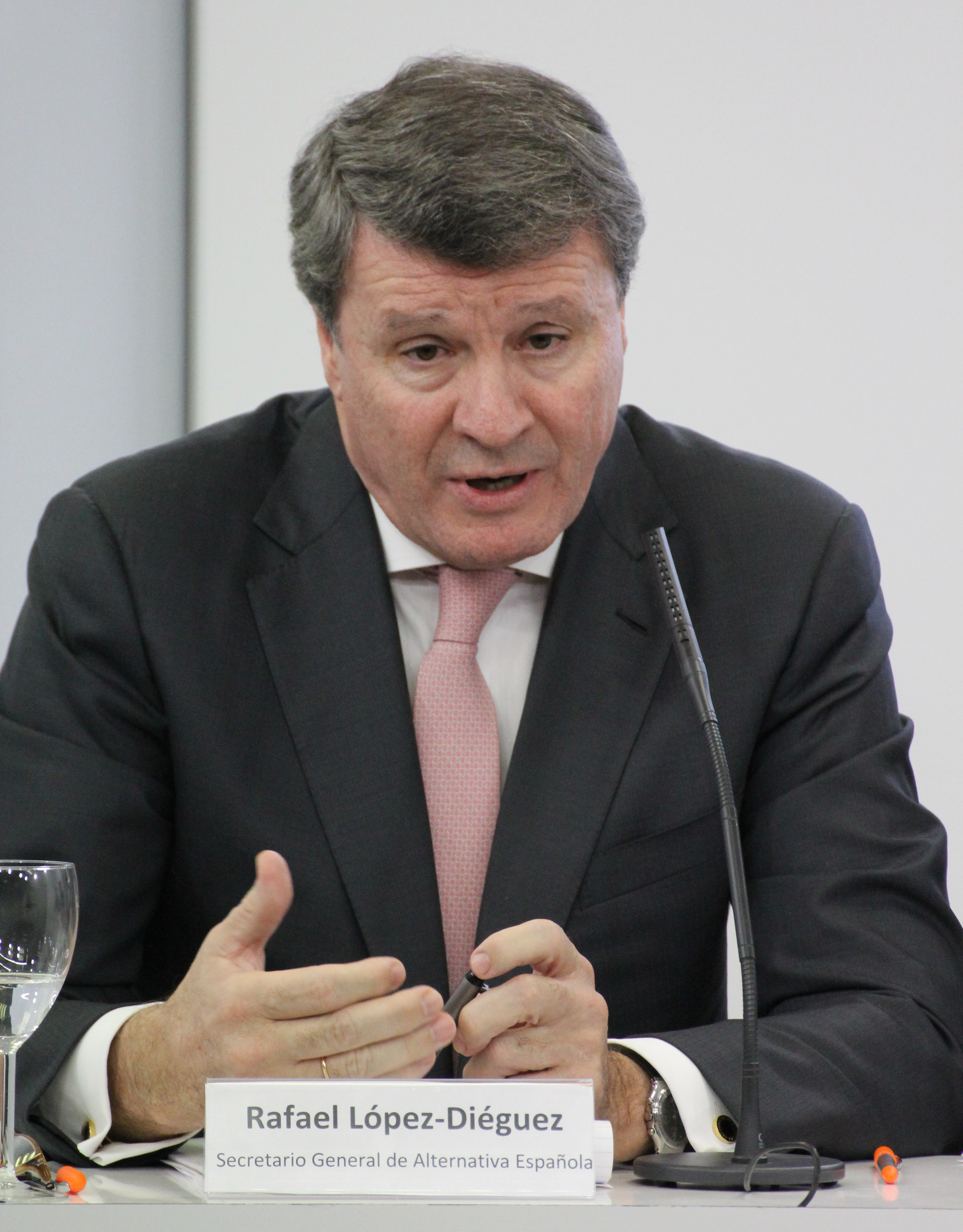 Entre las intervenciones de Rafael López-Diéguez Rafael López-Diéguez (AES) destacó: "los padres educan, los colegios enseñan. Educ. de respeto, de mérito, de sacrificio, de esfuerzo, de autoridad". En cuanto a la defensa de la vida, afirmó que "el #aborto es el crimen más execrable". #tertuliaHO